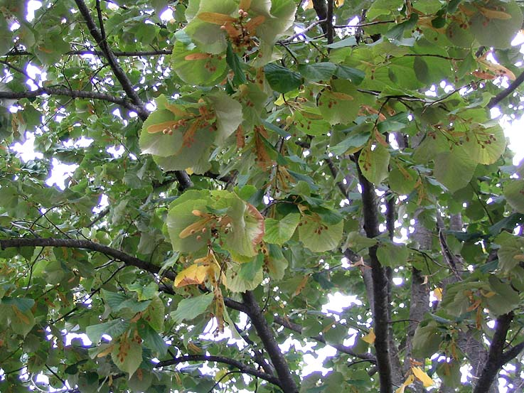 Tilia tomentosa (tilleul argenté) ; Photo prise à Vernet-les-Bains en octobre 2004 ; Jean Tosti 10/2004